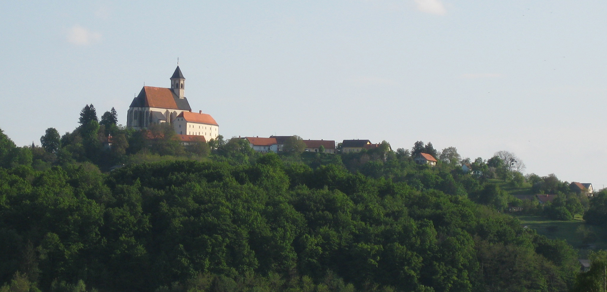 Ptujska gora, village in Slovenia